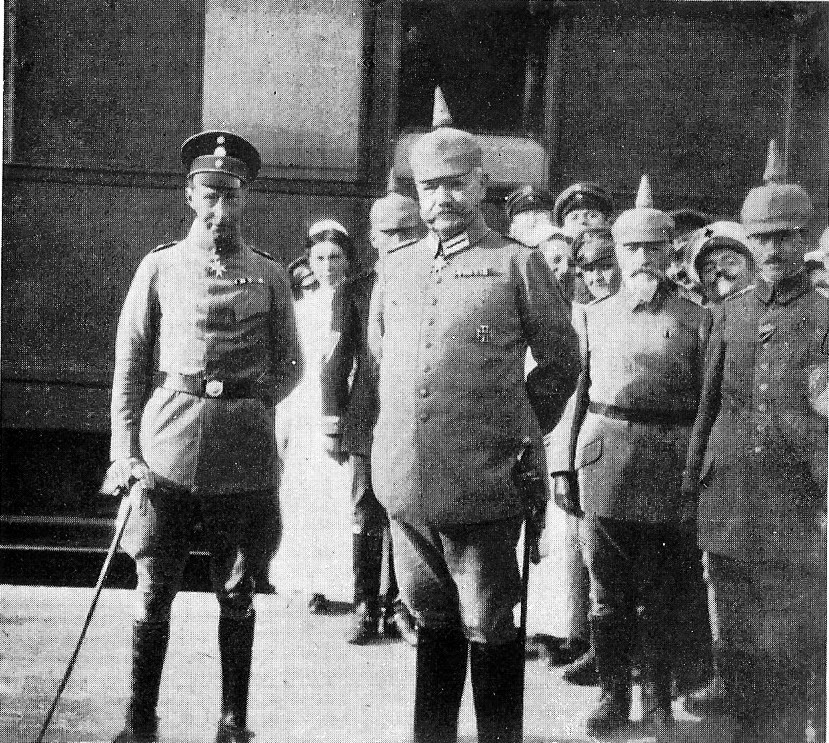 Begrüßung durch den Kronprinzen auf dem Bahnhof von Montmédy. Das Sturm-Bataillon Nr- 5 (Rohr) stellte die Ehrenkompanie.